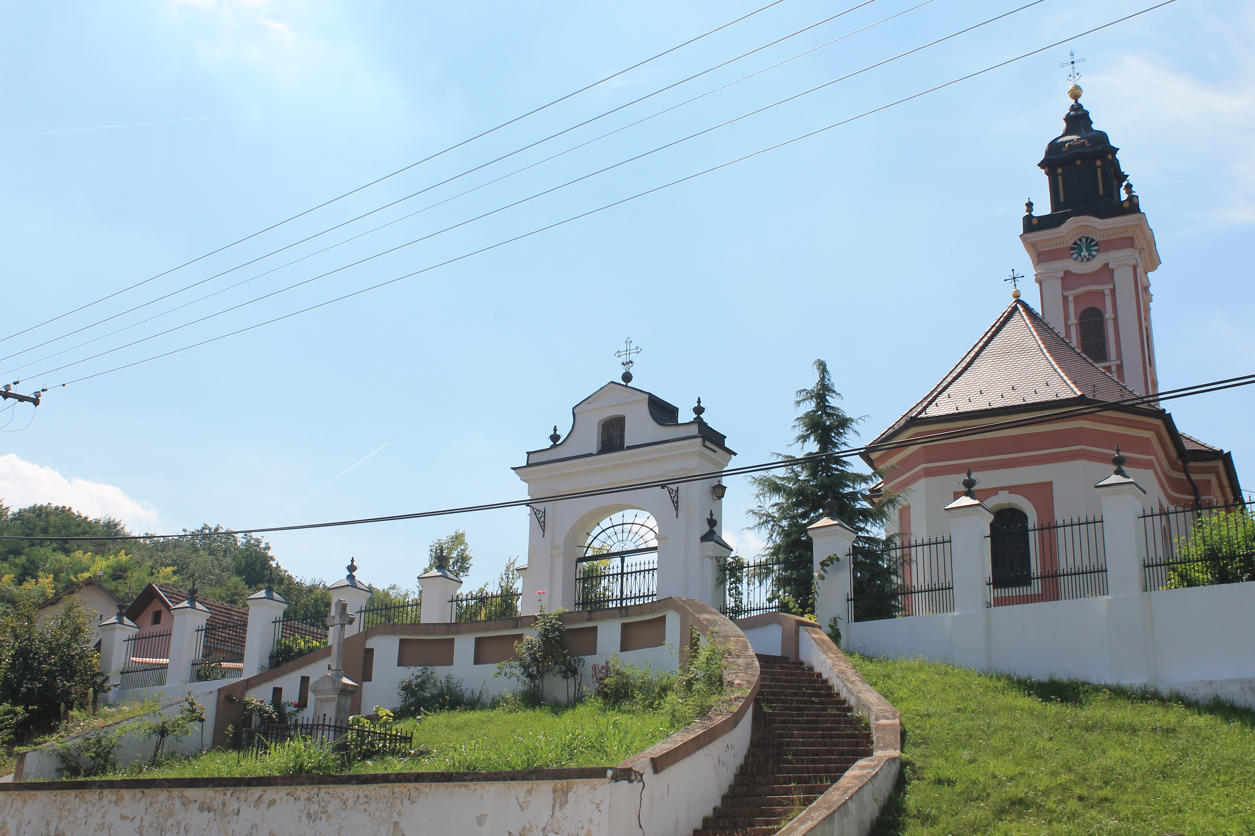 Crkva Vaznesenja Gospodnjeg (Bukovac)